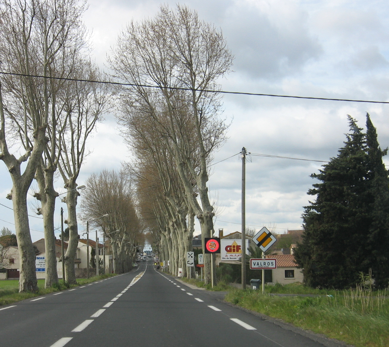 Valros (Hérault, France) - route nationale 9.